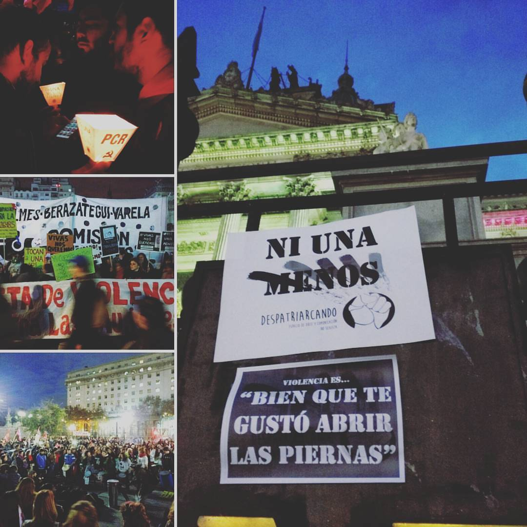 Marcha de ni una menos